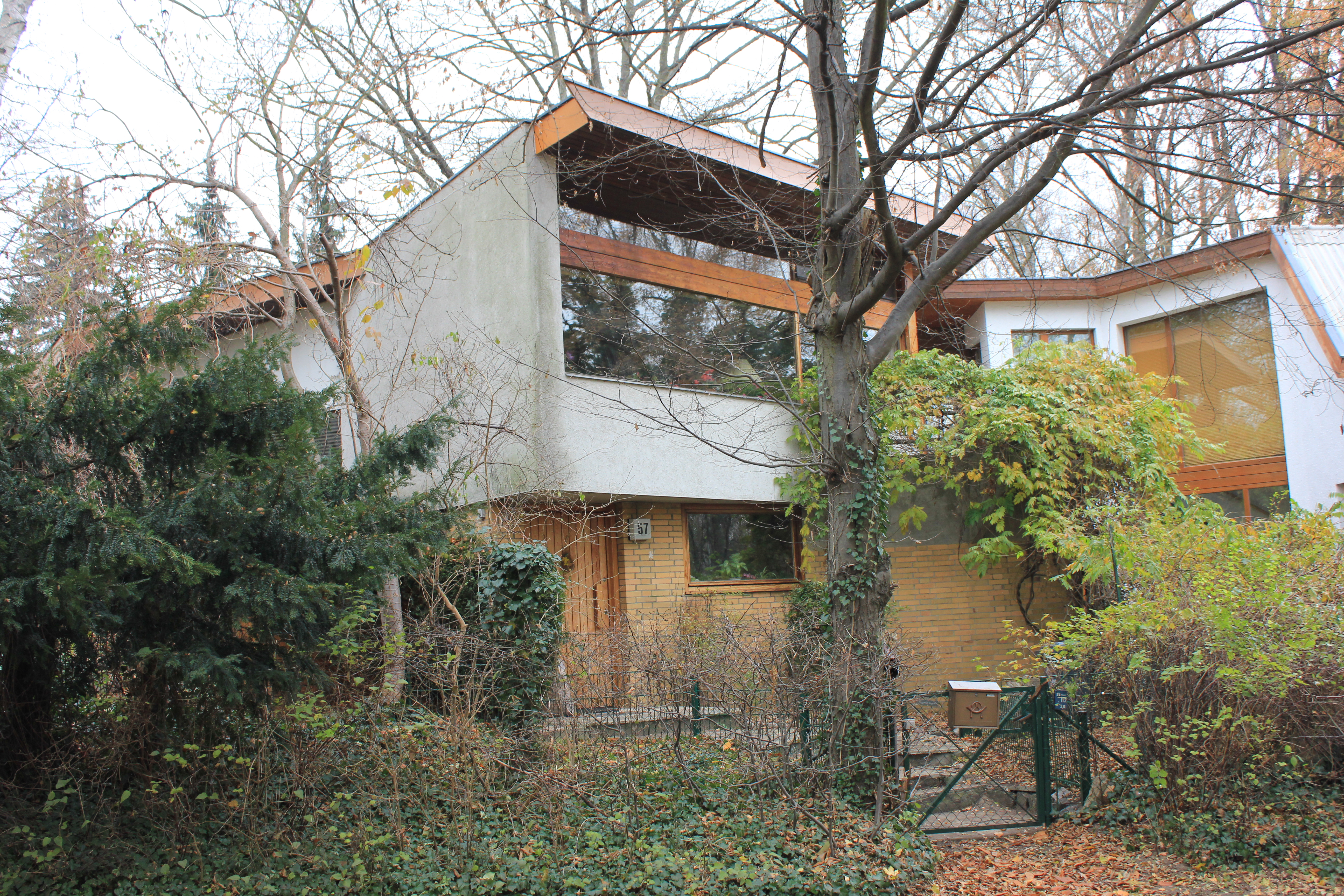 Wagner 1959-60 von Heinz Schudnagie